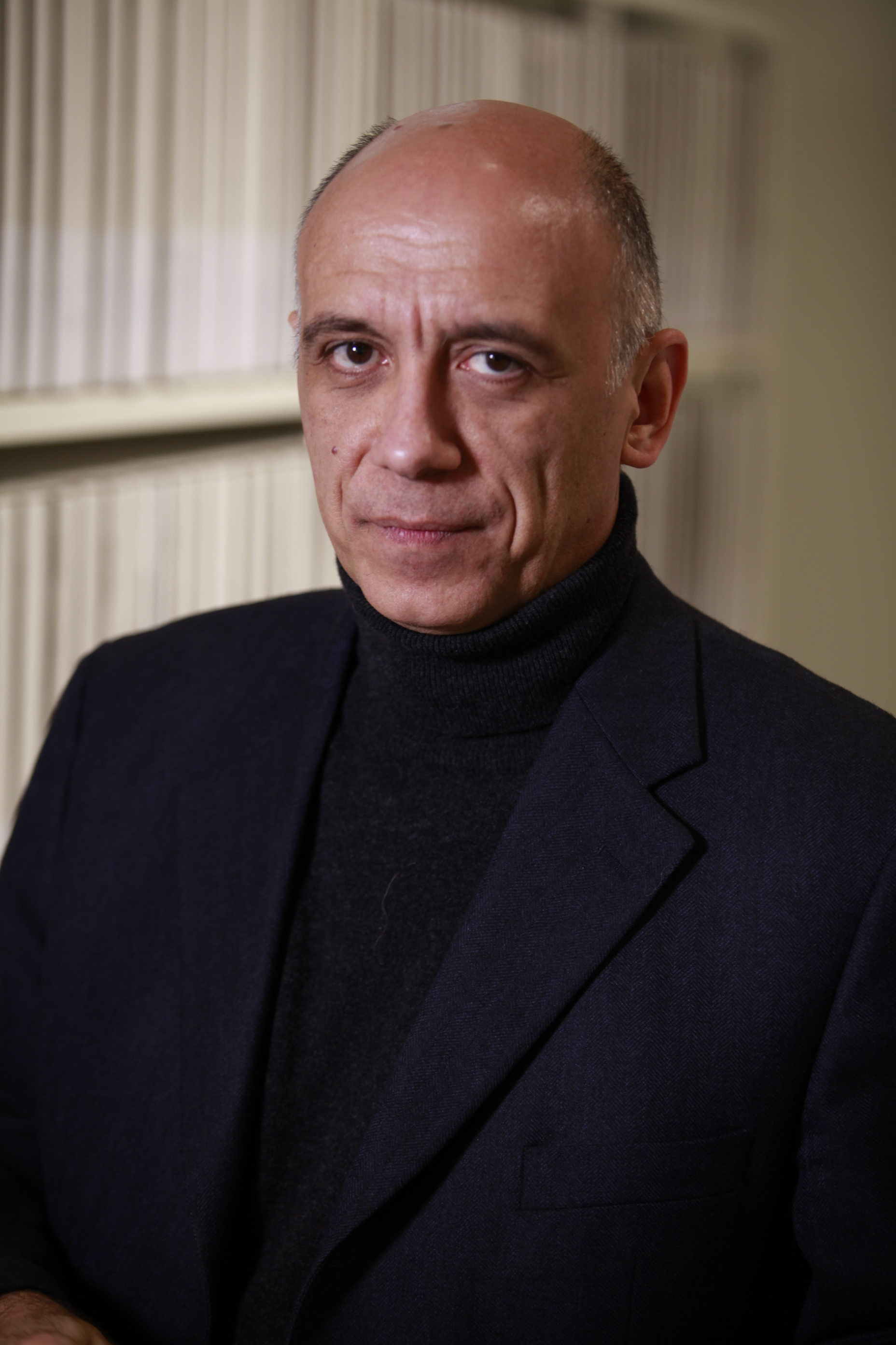 Bruno Ballardini - pubblicitario, scrittore e saggista italiano